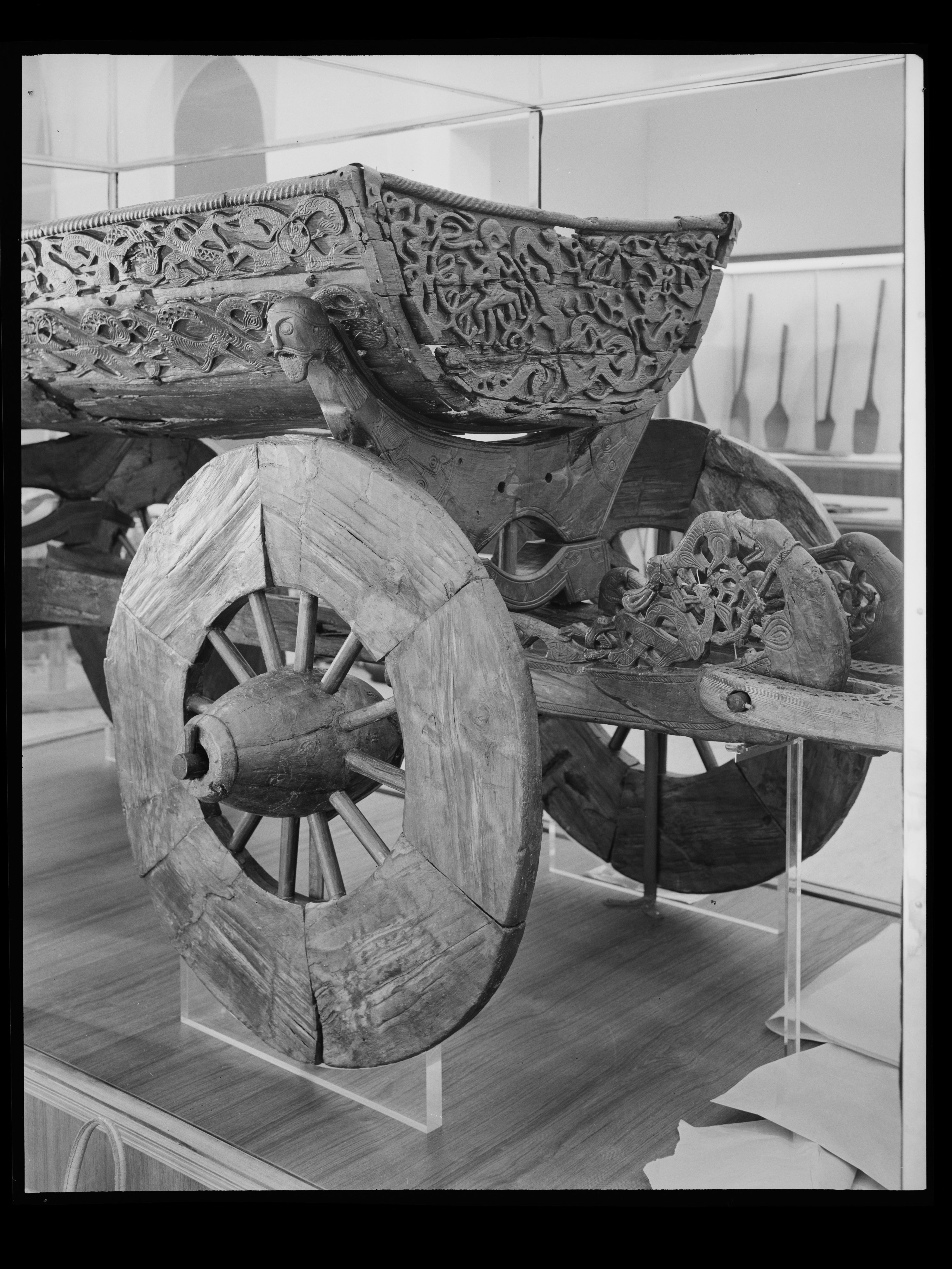 Bildet er hentet fra Nasjonalbibliotekets bildesamling Bygdøy,Oslo, Oslo, Oslo